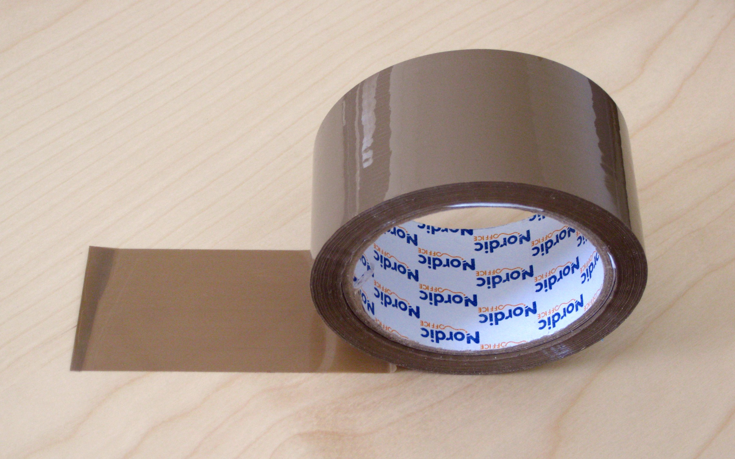 Packtape